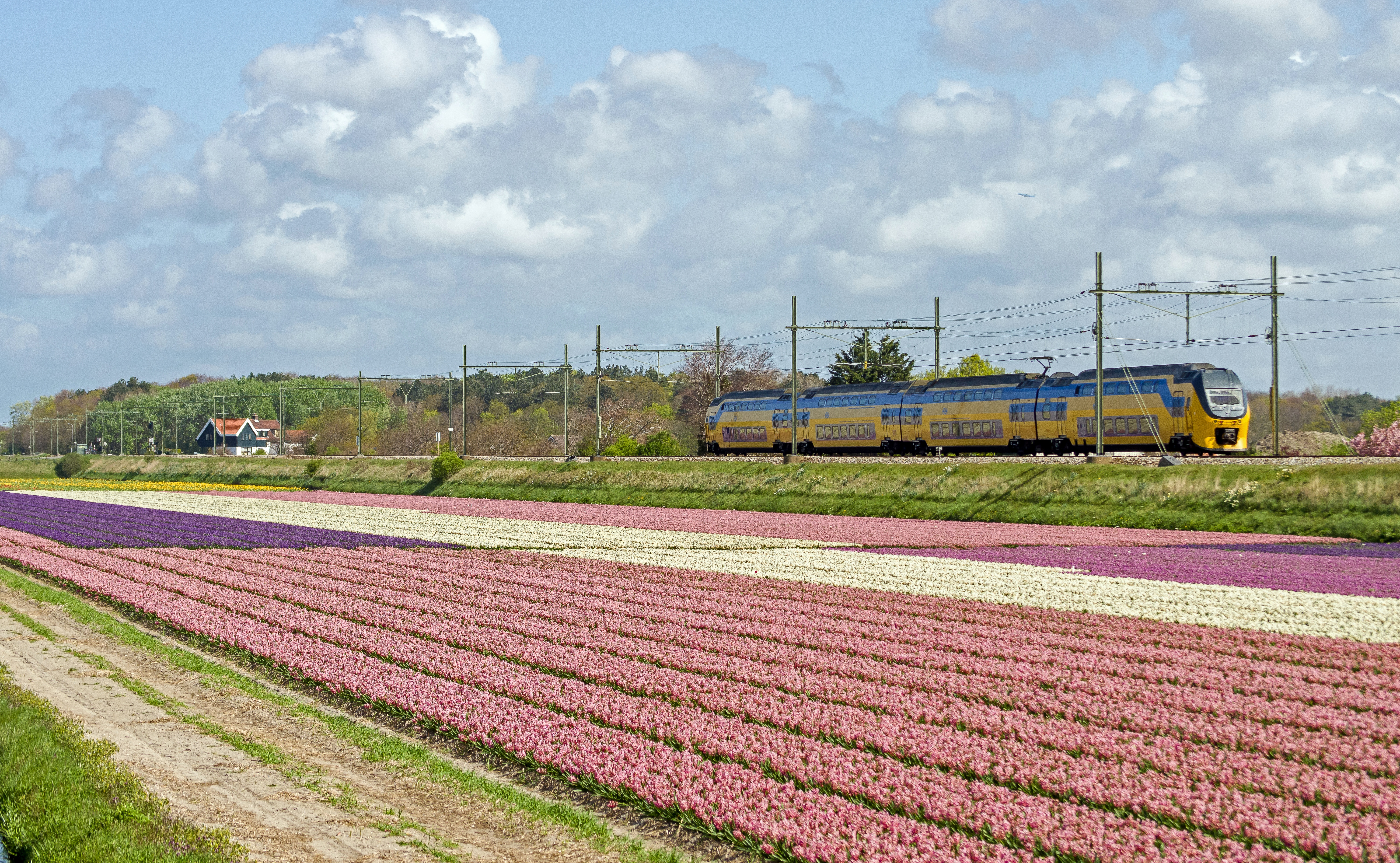 Het dubbeldeks stel 9571 als IC naar Dordrecht laat Vogelenzang achter zich op weg richting Leiden.